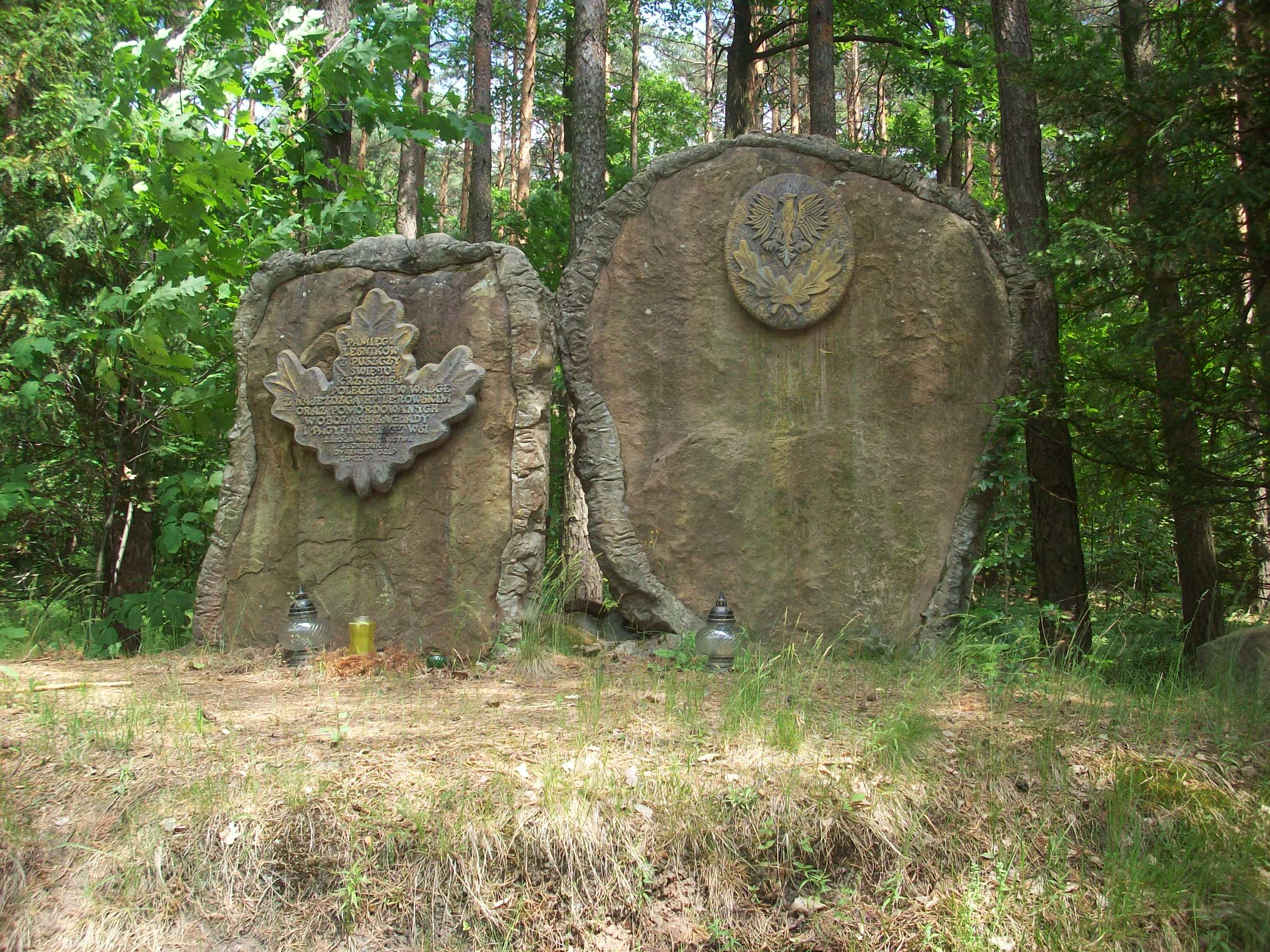 Suchedniów - Michniów